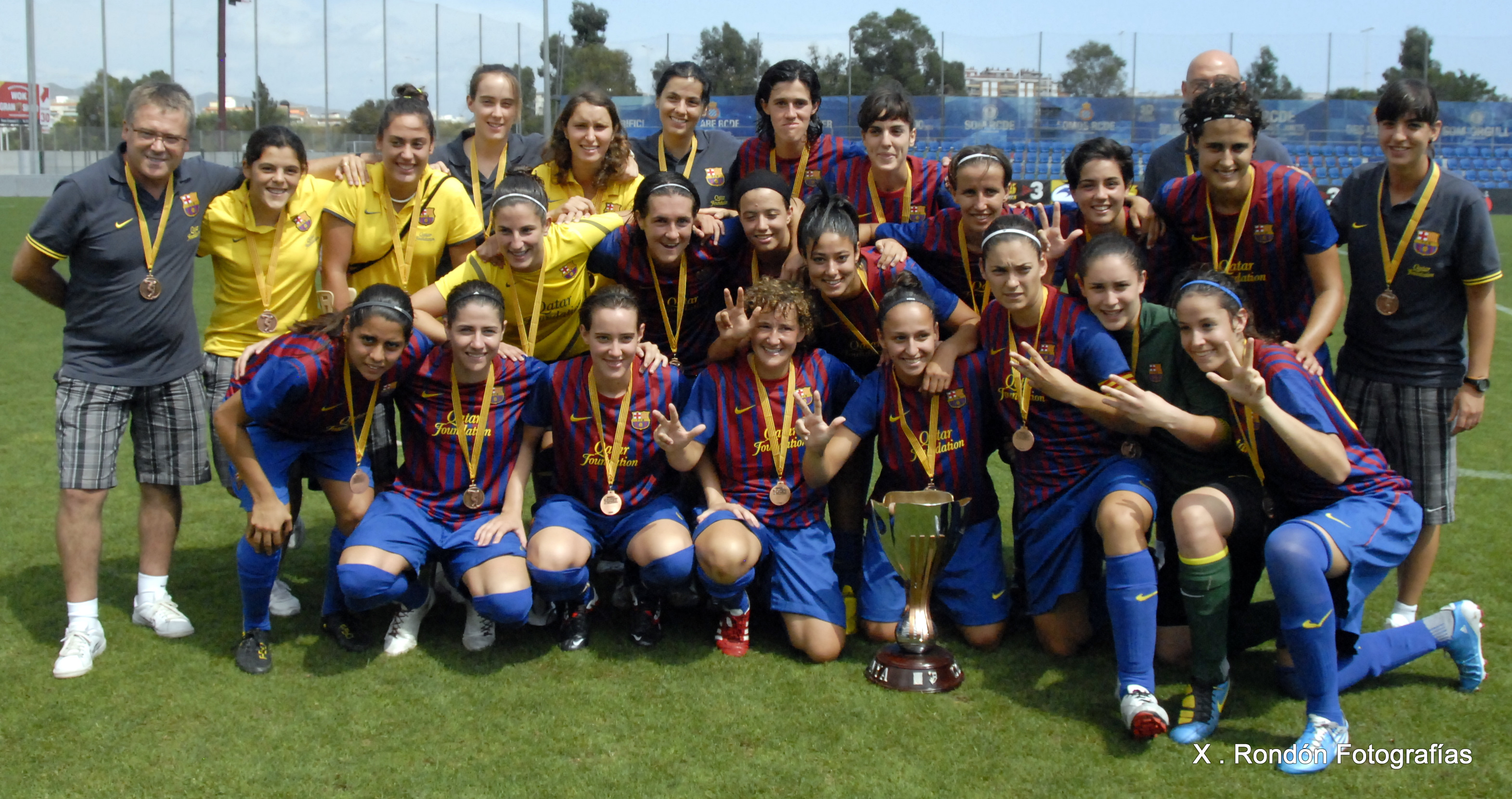 2011 Copa Catalunya (womens) final